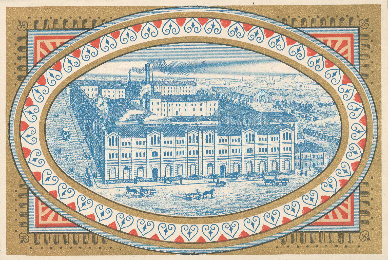 Nürnbergs bryggeri, hela anläggningen i kvarteret Dykärret Mindre, vy västerifrån med Swedenborgsgatan i förgrunden och Högbergsgatan till vänster.